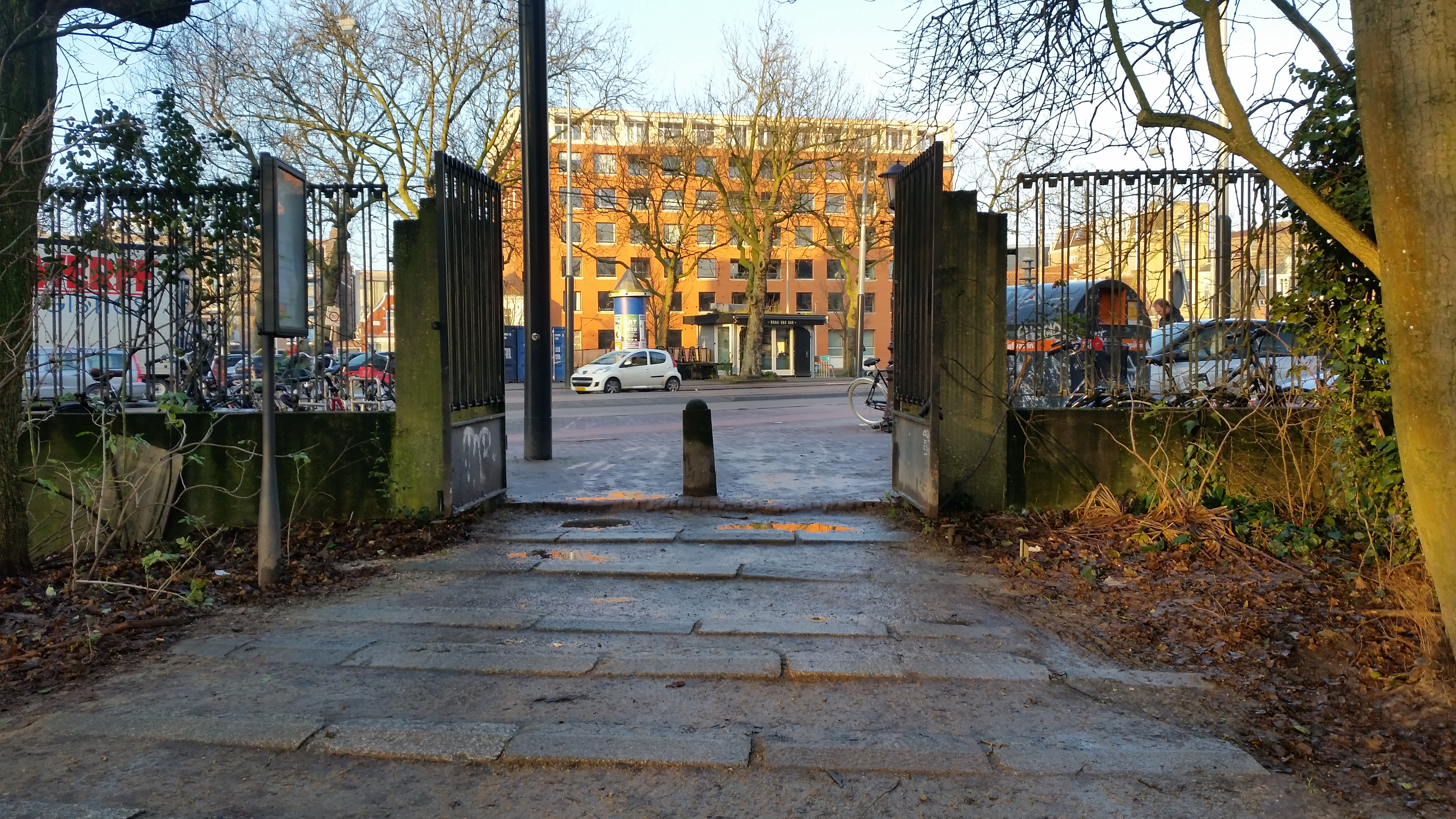 Toegangshek Vondelpark-Amstelveenseweg, toegang vanuit het park